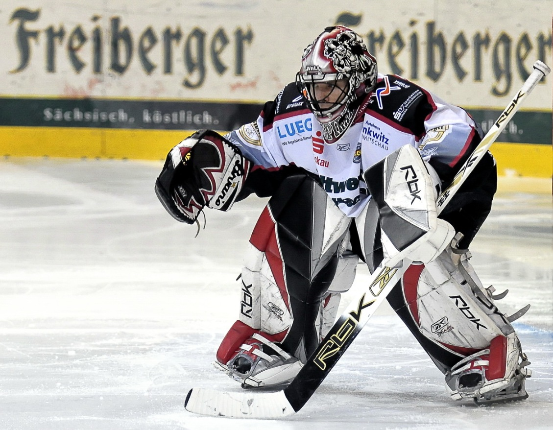 Marko Suvelo, finnischer Torhüter des Eishockey- & Tennisclub Crimmitschau